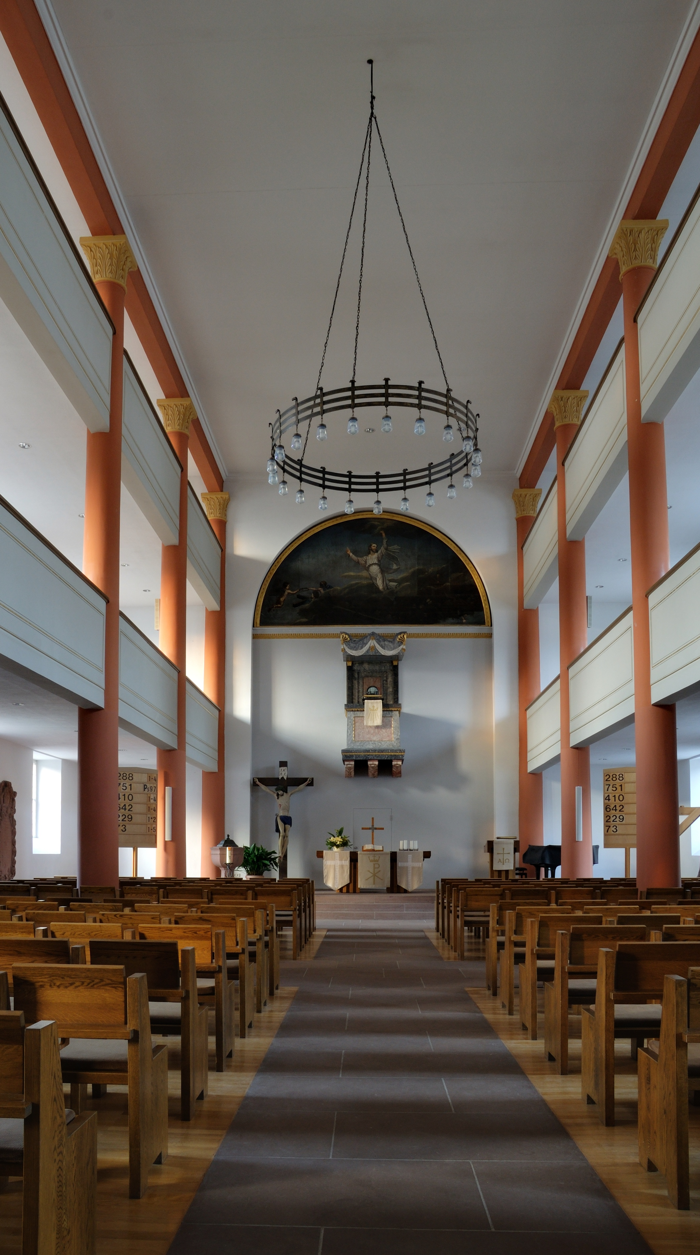 Kandern: Evangelische Kirche, Blick ins Langhaus